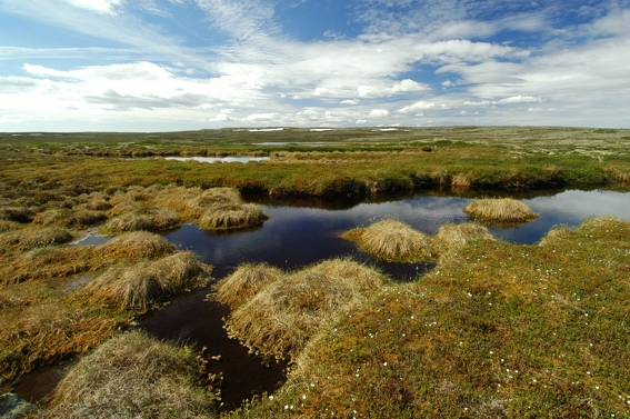 Die abwechslungsreiche Hochebene des Fulufjällets